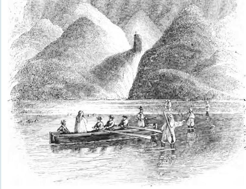 Painting from William Francis Lynch book The Narrative of the United States Expedition of the River Jordan and the Dead Sea. Published in 1849 ציורים מספרו של ויליאם פרנסיס לינץ' שחקר את הירדן וים המלח בשנת 1848. הספר פורסם בשנת 1849 השיט על ים המלח ברקע עמודי המלח של הר סדום